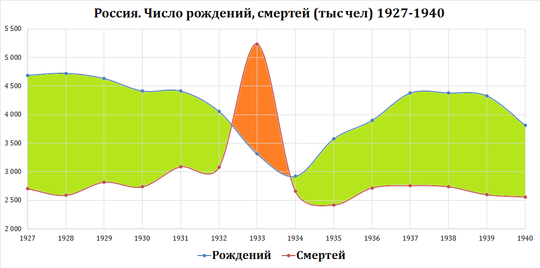 Россия. Число рождений, смертей (тыс чел) 1927-1940